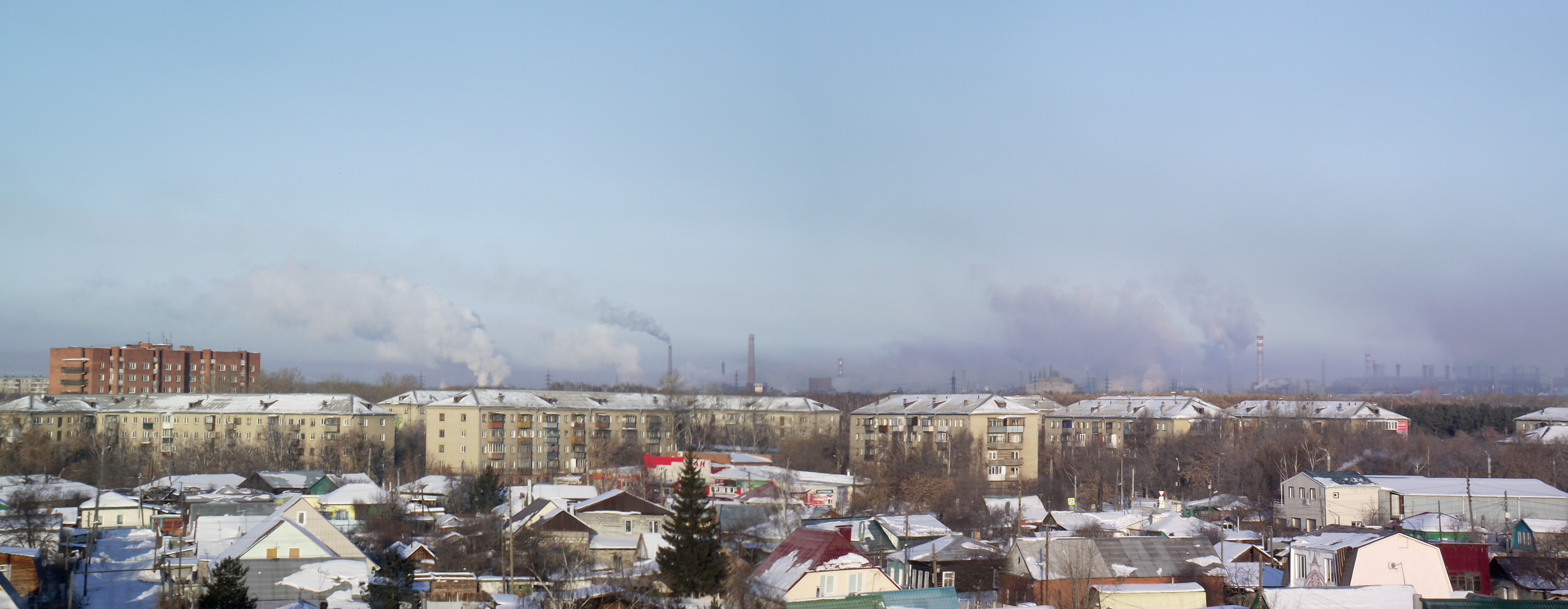 Панорама. Вид с планового ЧТЗ на заводы. Справа ЧЭМЗ, перед вами дома по улице Бажова.